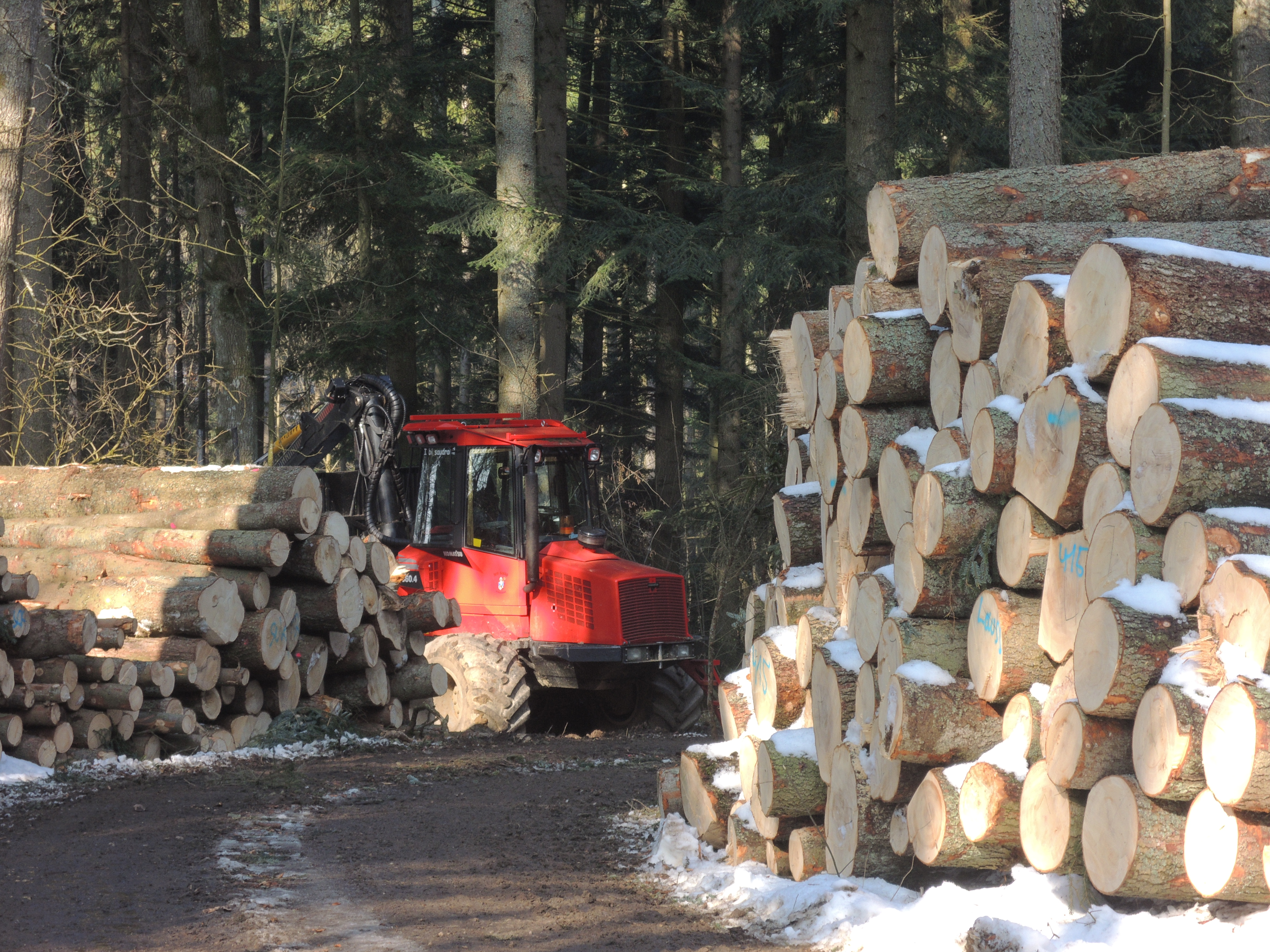 Gefällte Baumstämme in einem Forst des Stift Schlägl. In der Bildmitte ein Forwarder. (Rückezug)